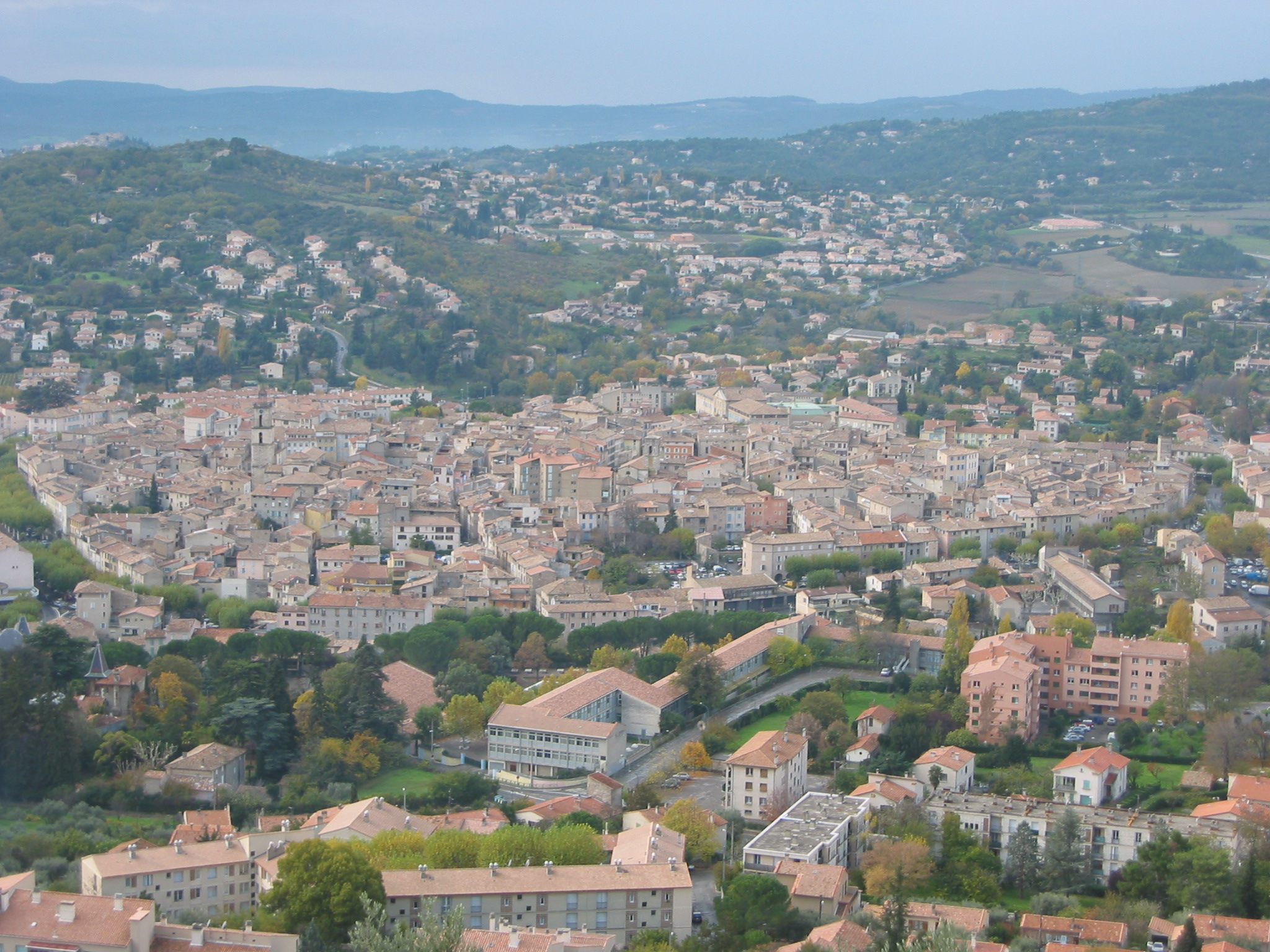 Vue générale sur Manosque depuis le Mont d'Or, Provence, France